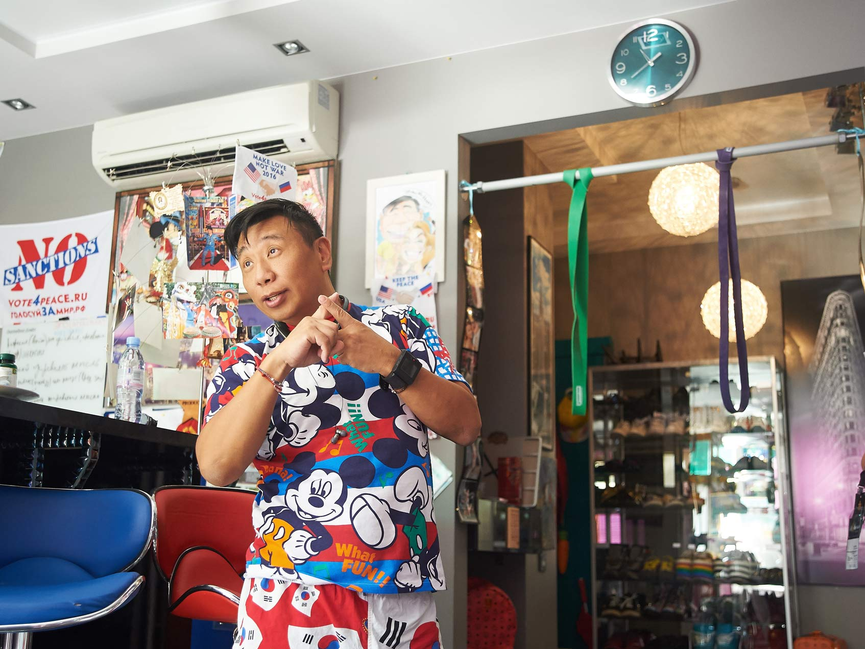 Лаки Ли - миротворец и PeaceMan